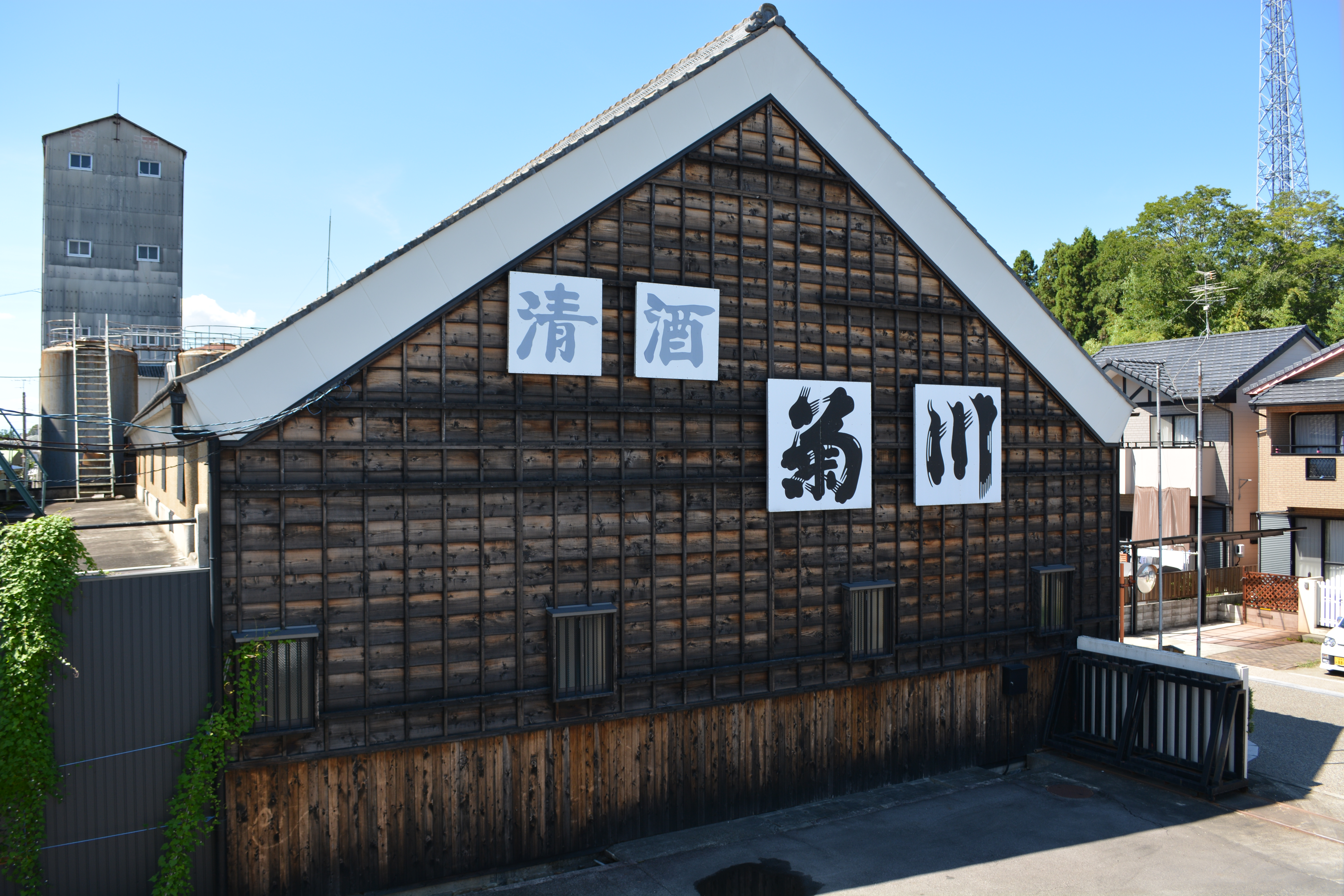 菊川株式会社本社